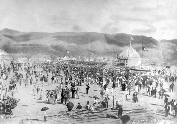 Inauguração de Belo Horizonte, em 1897